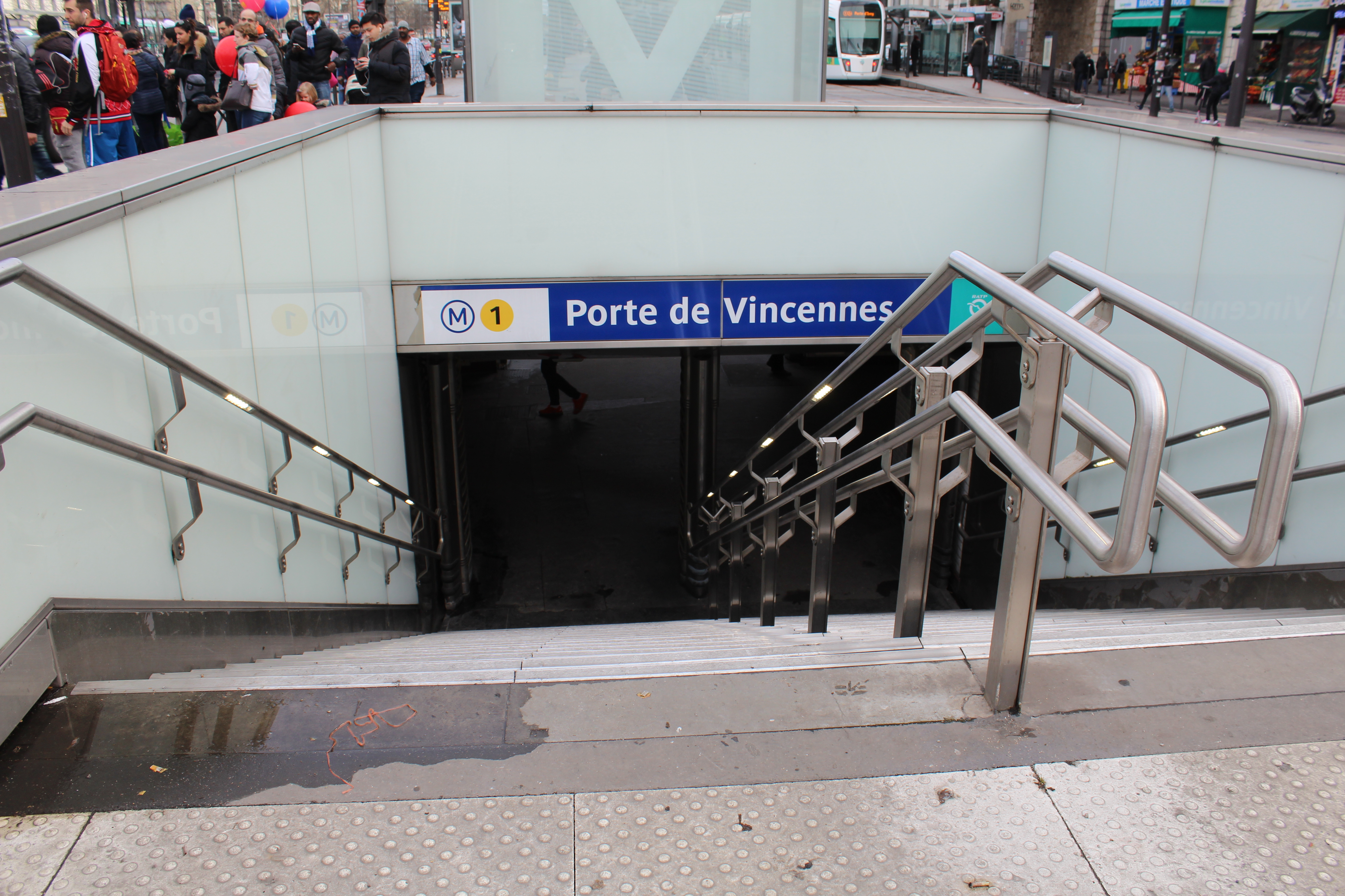 Entrée de la station de métro Porte de Vincennes à Paris.